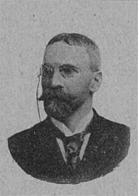 František Hruban (1852-1930), rakouský soudce a politik z Moravy; poslanec Moravského zemského sněmu